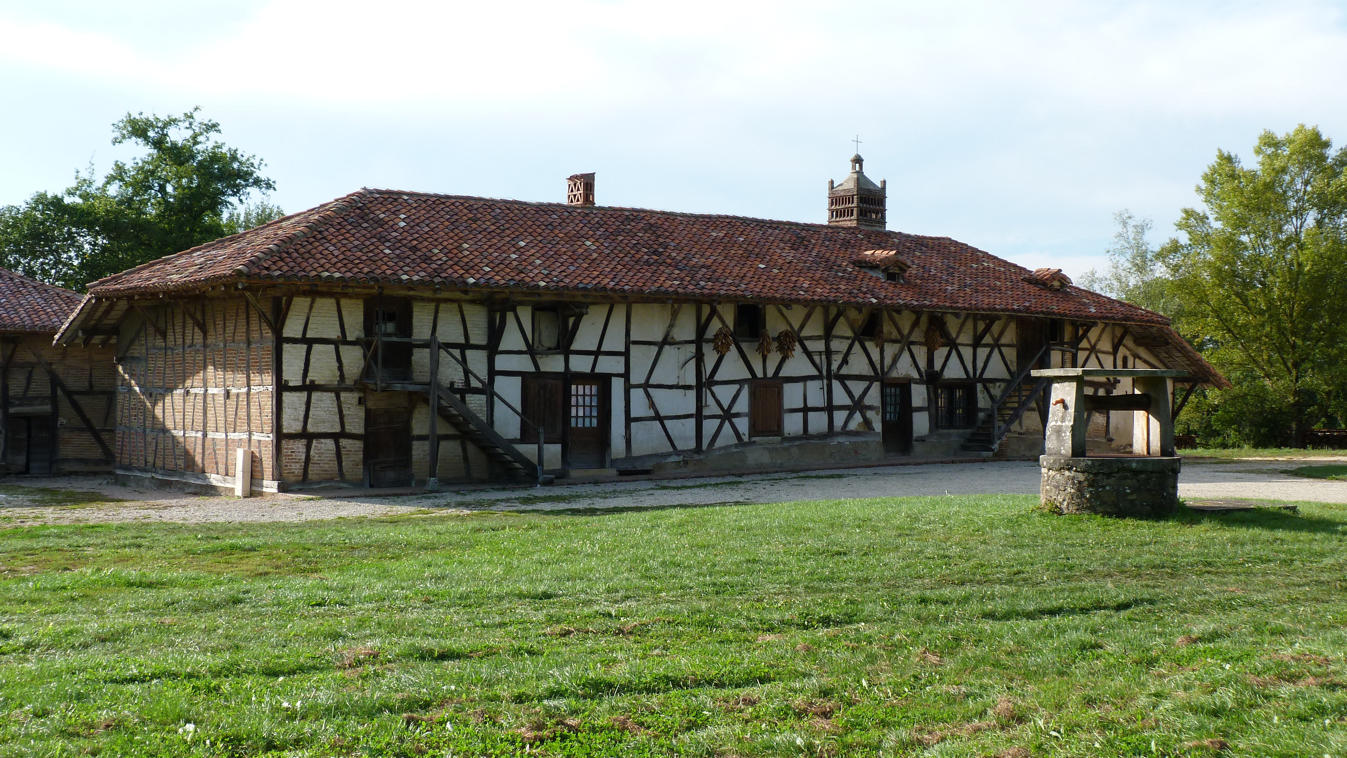 Ferme de Sougey, sa cour, et son puits